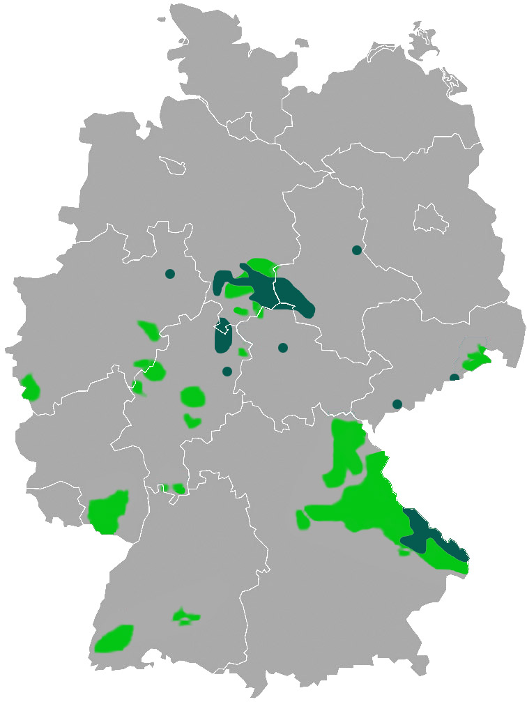 Verbreitung des Nordluchses in Deutschland nach WWF Magazin, Ausgabe 1/2012, Seite 22